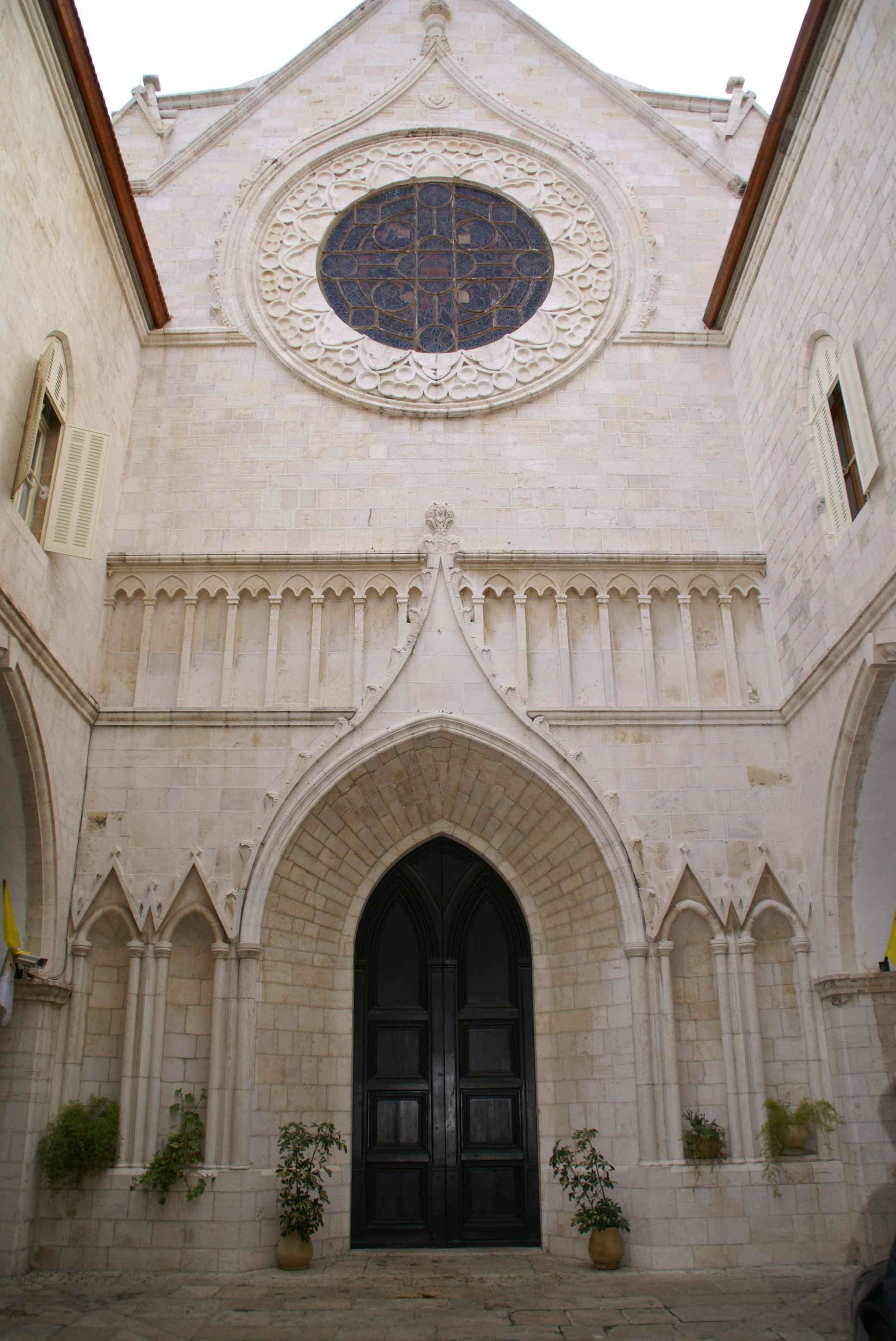 Portal der Konkathedrale (Bischofskirche) im Lateinischen Patriarchat Jerusalem